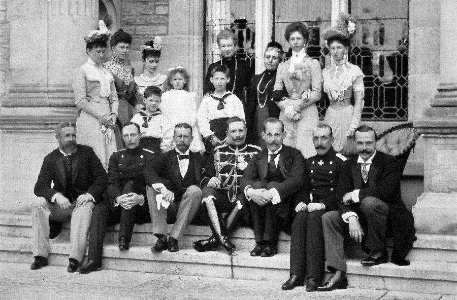 Obere Reihe: Prinzessin Heinrich von Preußen (geb. Prinzessin Irene von Hessen), Kronprinzessin von Griechenland (geb. Prinzessin Sophie von Preußen, Erbprinzessin von Sachsen-Meiningen (geb. Prinzessin Charlotte von Preußen), davor Prinz Alexander (später König Alexander I. von Griechenland), Prinzessin Helene von Griechenland (später Königin von Rumänien), Prinz Georg (später König II.) von Griechenland, dahinter Kaiserin Auguste Viktoria, Kaiserin Friedrich, Prinzessin Adolf zu Schaumburg-Lippe (geb. Prinzessin Viktoria von Preußen), Prinzessin Friedrich Karl von Hessen (geb. Prinzessin Margarethe von Preußen). Untere Reihe (sitzend): Prinz Adolf zu Schaumburg-Lippe, Prinz Friedrich Karl (später Landgraf) von Hessen, Prinz Heinrich von Preußen, Kaiser Wilhelm II., Kronprinz Konstantin (später König Konstantin I.) von Griechenland, Prinz Albert von Schleswig-Holstein, Großherzog Ernst Ludwig von Hessen.